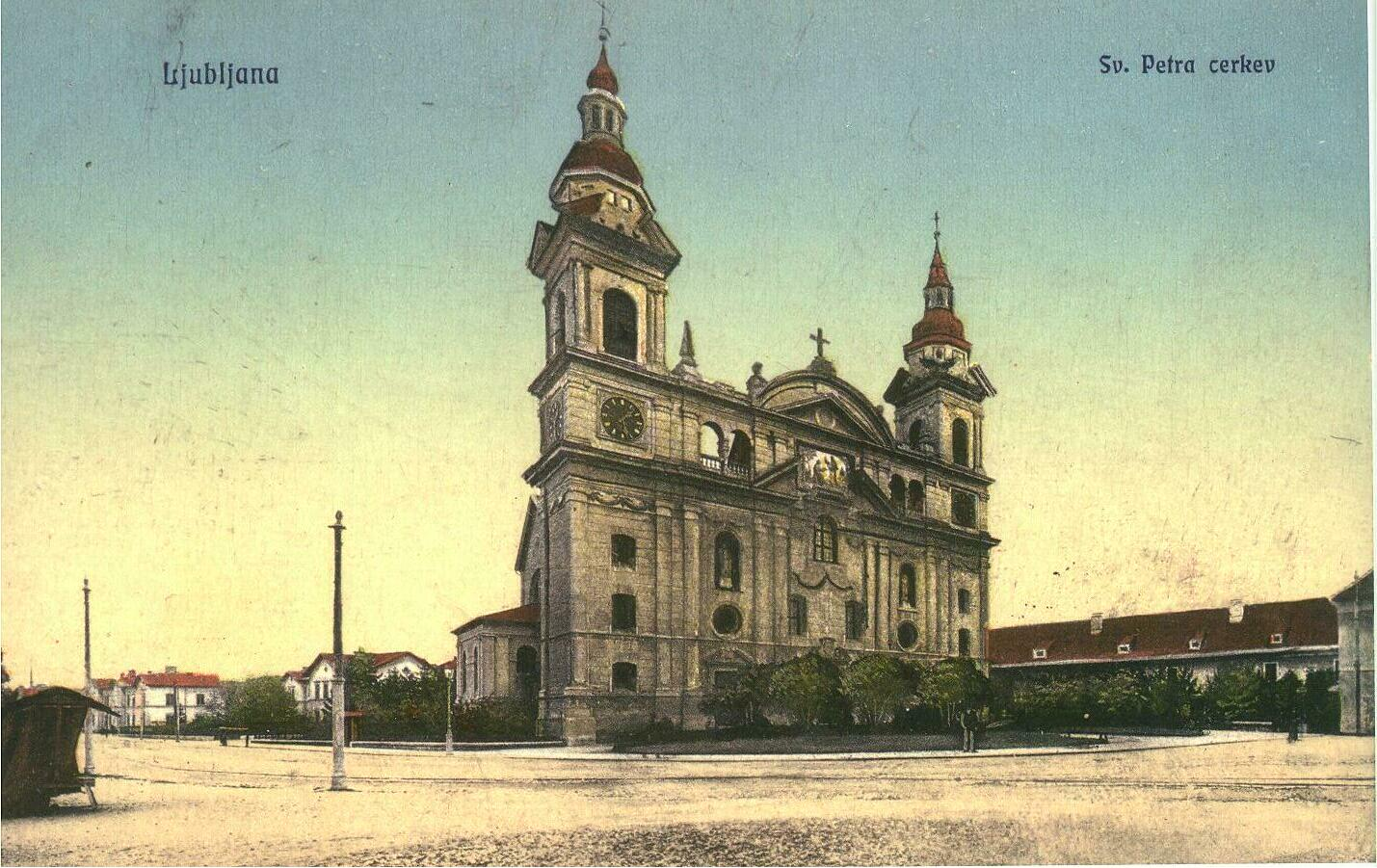 Cerkev sv. Petra v Ljubljani - izgled v letu 1914.